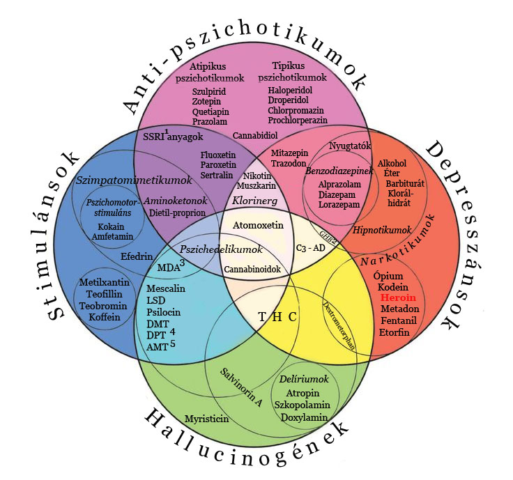 Pszichoakív drogok és a heroin